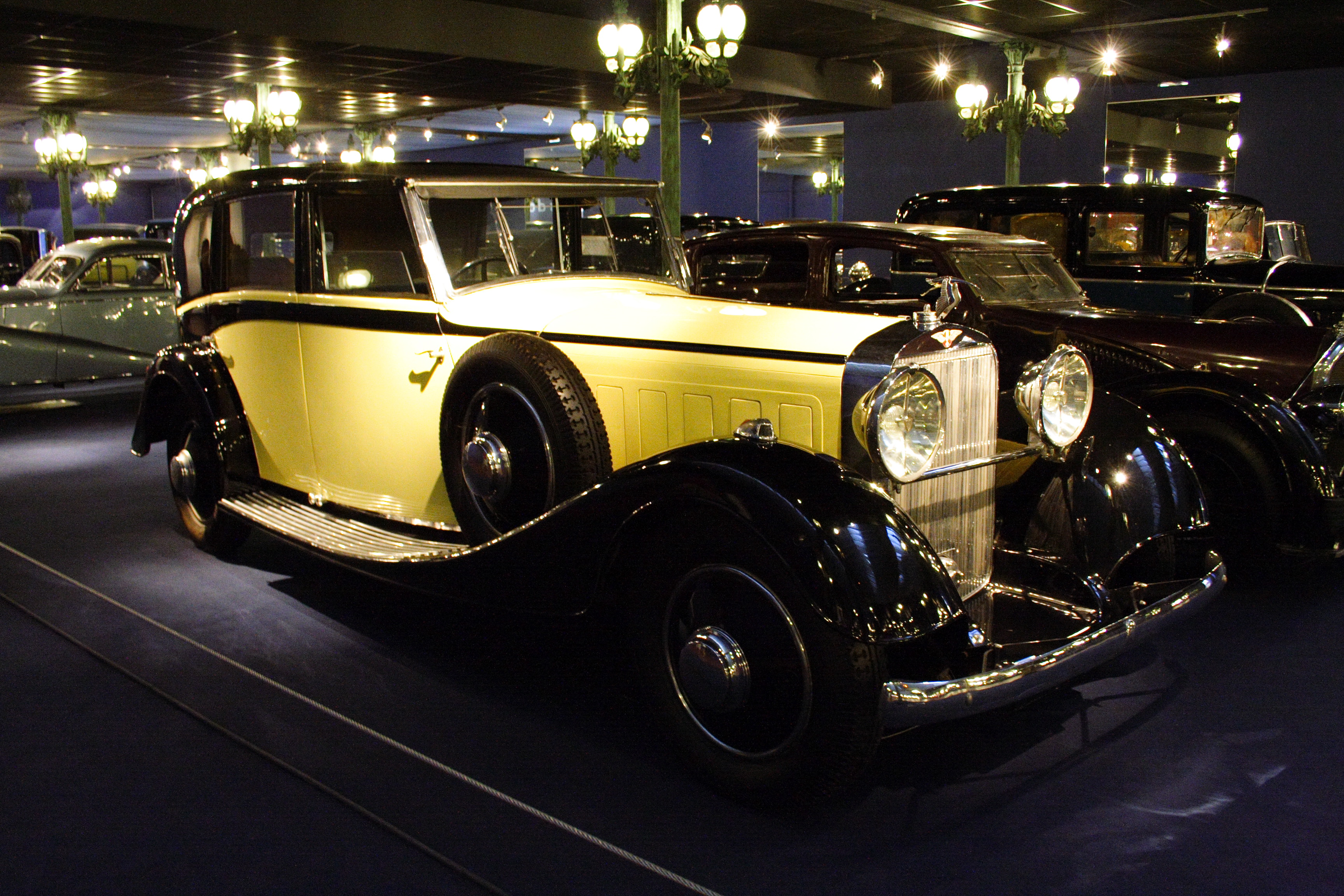 Hispano-Suiza Coupé Chauffeur J12 1934 at the Musée National de l'Automobil(Mulhouse, France)